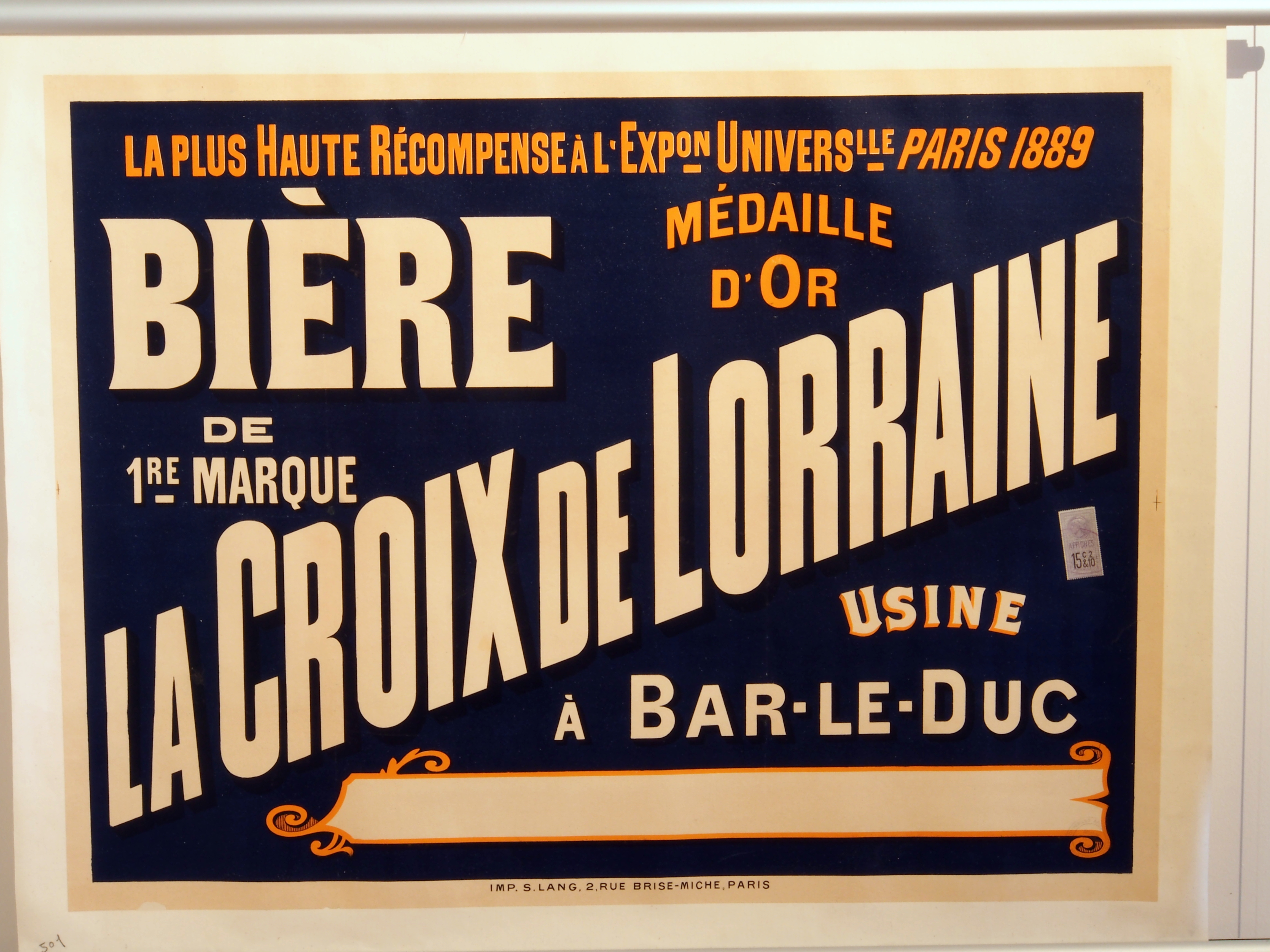 Bière La Croix de Lorraine.